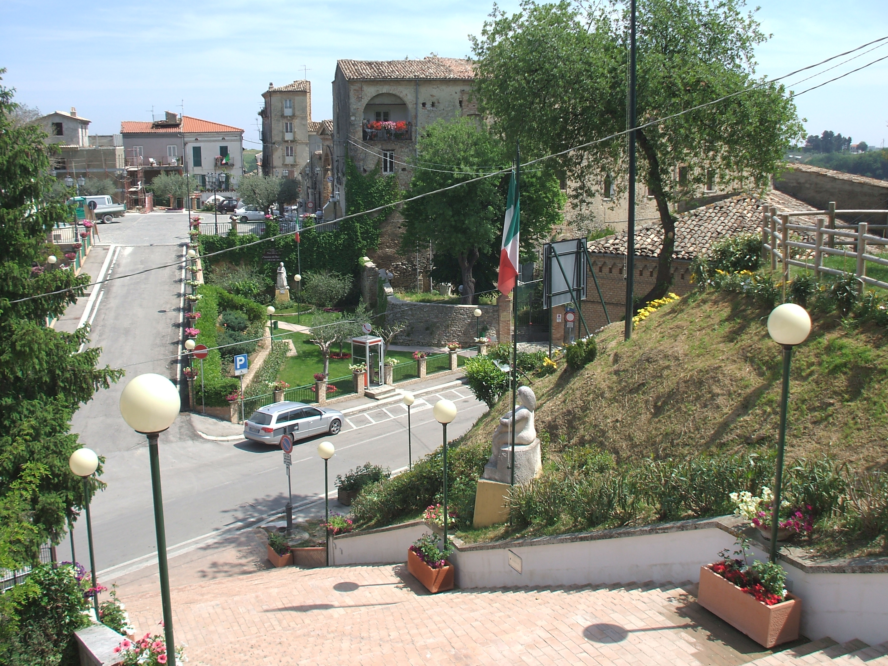 Veduta del paese di Ari (CH) fotografata dalla chiesa parrocchiale. Giardini pubblici e al centro piazza Bucciante.